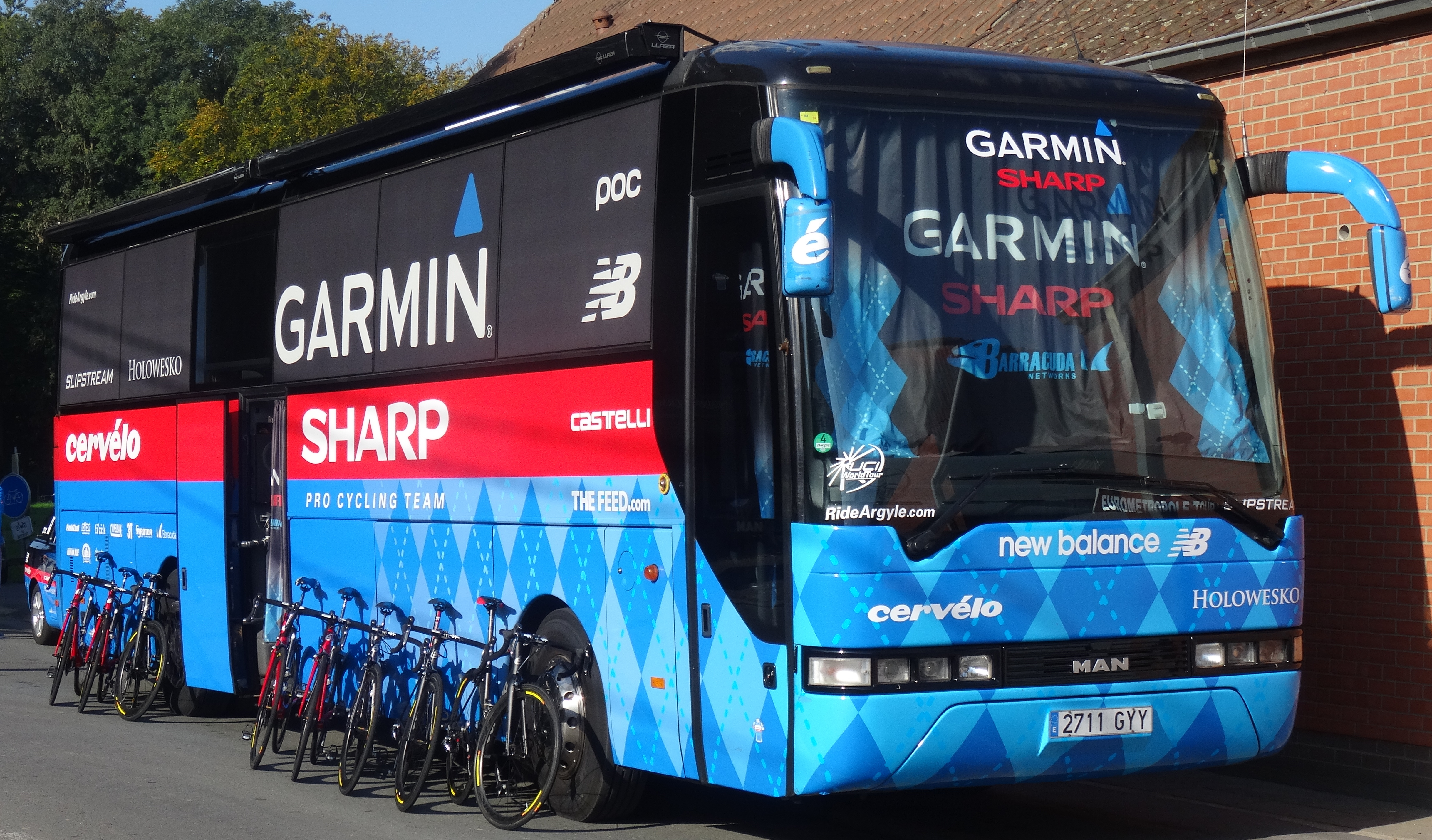 Reportage photographique réalisé le vendredi 3 octobre à l'occasion du départ de la deuxième étape de l'Eurométropole Tour 2014 à Estaimbourg (Estaimpuis), Belgique.